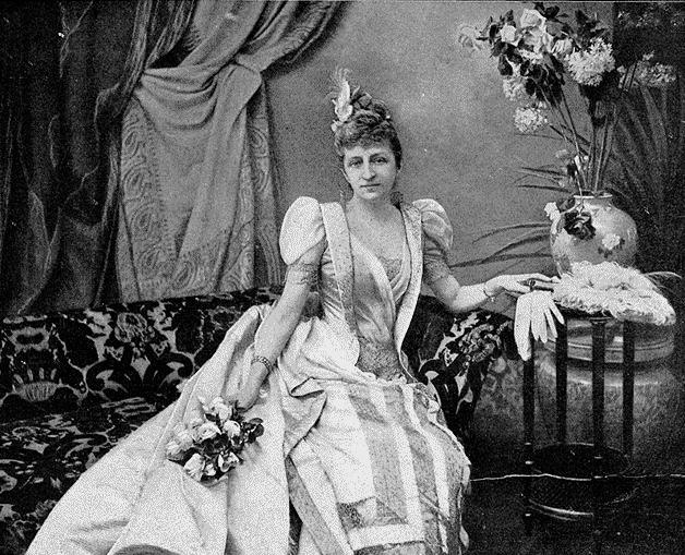 Photographie vers 1880 de la princesse de Sagan née Jeanne Seillière (1839-1905) parue dans l'Illustration, n° 3269, 21 octobre 1905.